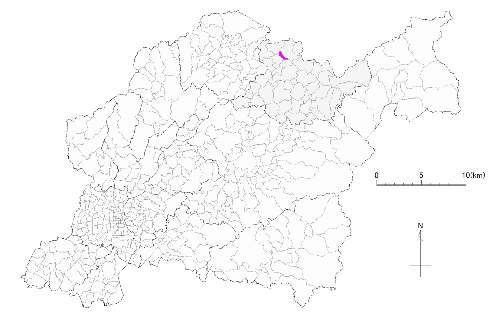 豊田市三分山町位置図